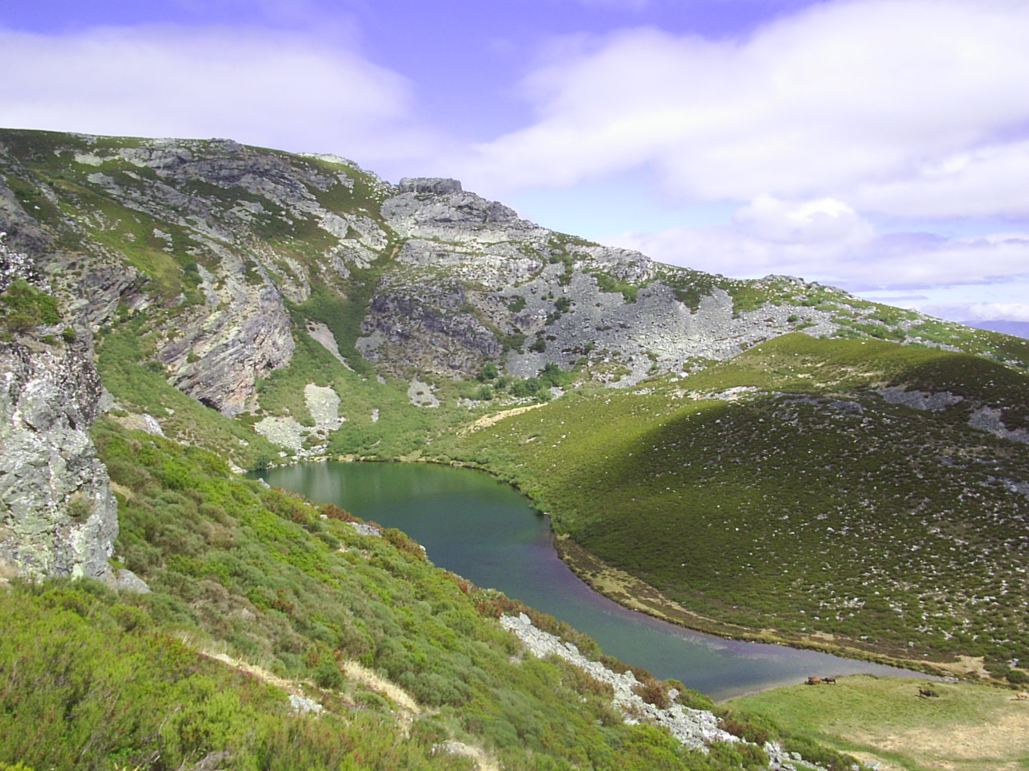 Lago de Truchillas bajando desde el Pico Vizcodillo